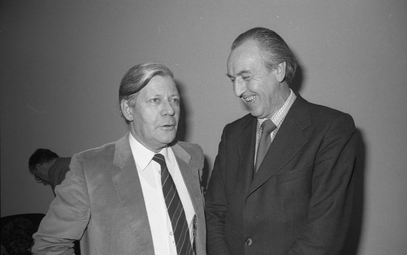 Außerordentlicher Parteitag der SPD im Messe-Kongreß-Zentrum in Köln zur Vorbereitung für die Europa-Parlament-Wahl 1979